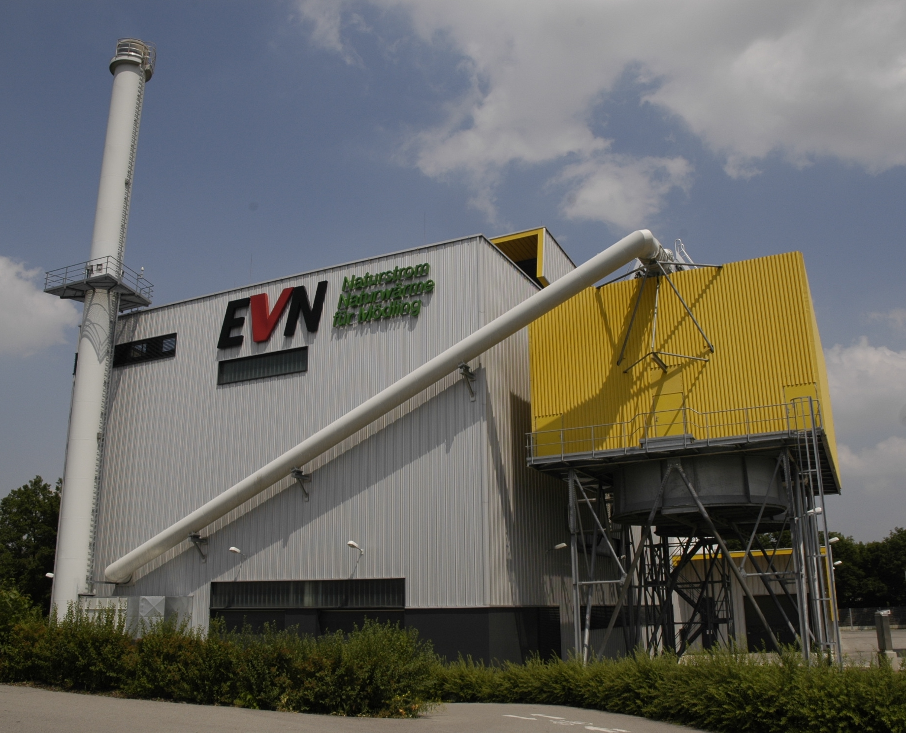 Biomasseheizkraftwerk Mödling von West der EVN Wärme